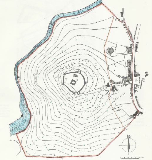 Planta do castelo de Belver com as zonas de protecção. Fonte: DGMN.